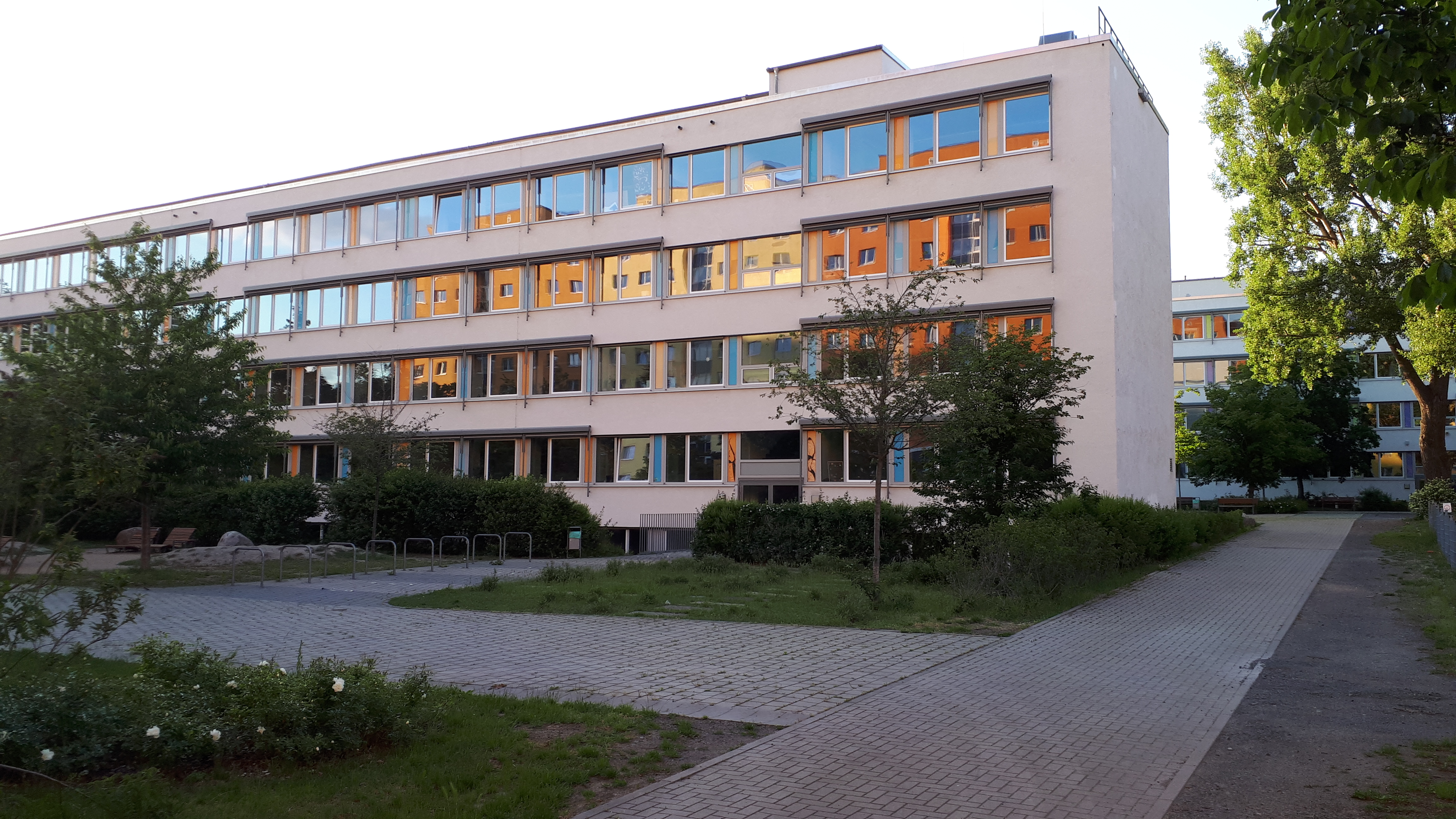 Wilhelm-Ostwald-Gymnasium Leipzig